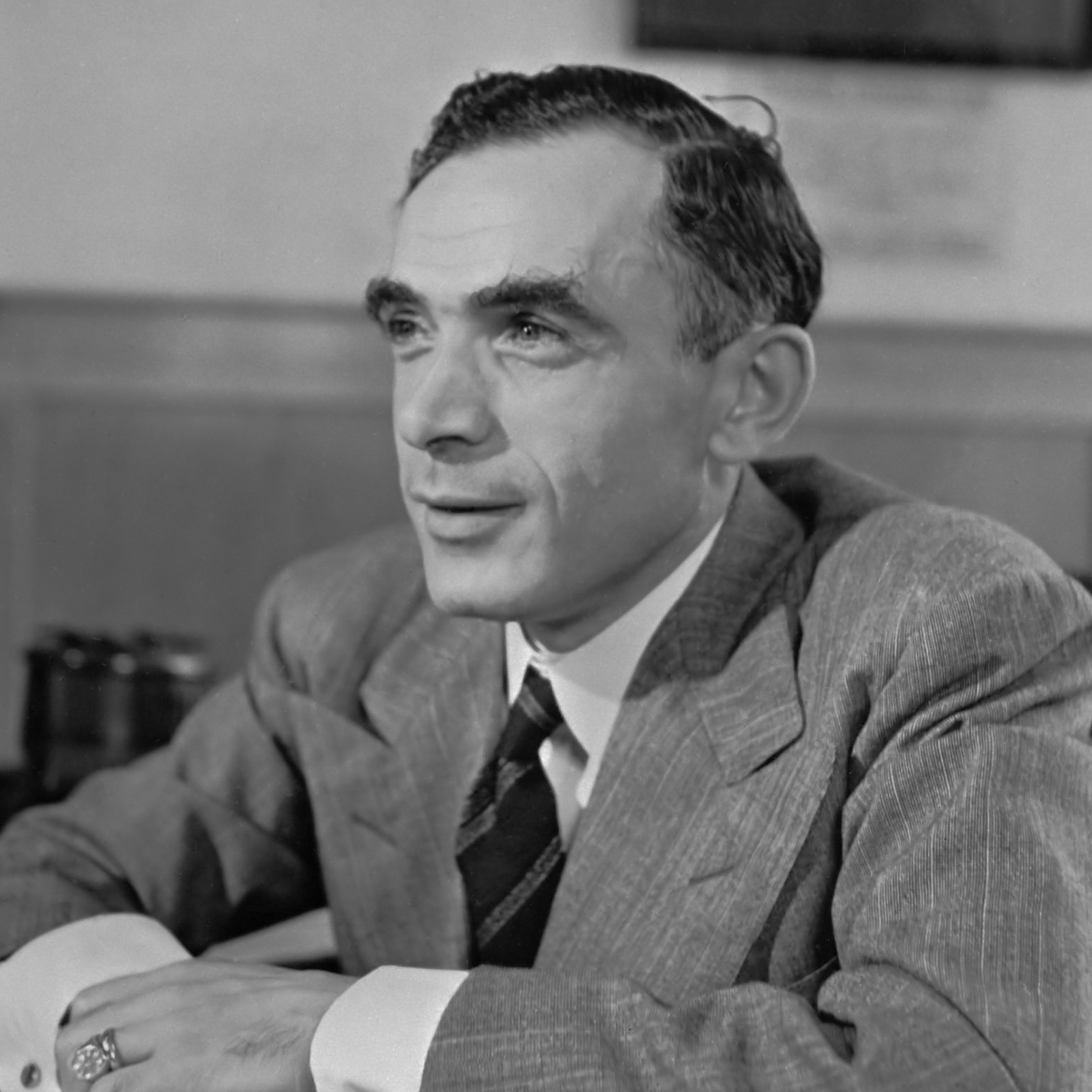 Dr. P.A. Kasteel, gouverneur van Curacao 1942